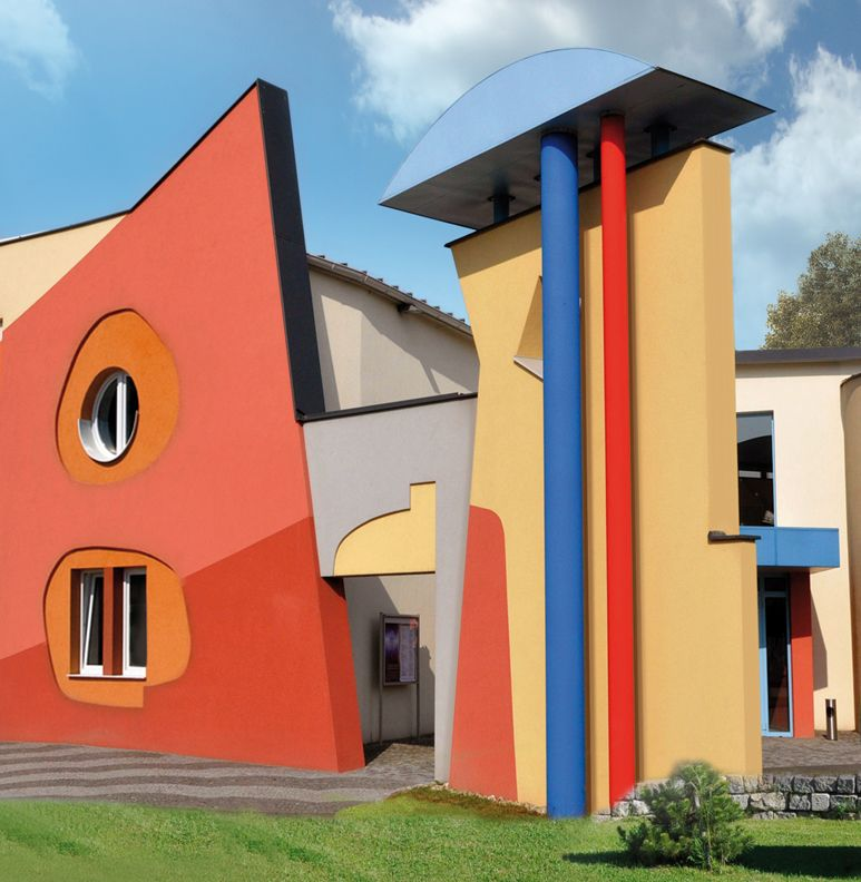 Das Kusntmuseum Waldviertel in Schrems